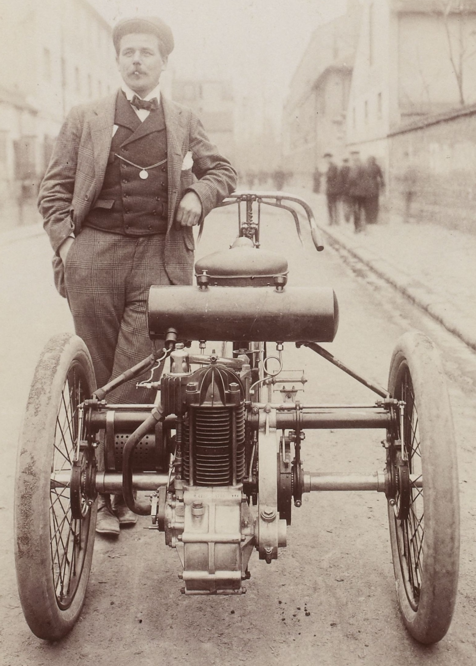 [Collection Jules Beau. Photographie sportive] : T. 16. Années 1901 et 1902 / Jules Beau : F. 21v. Osmont, 10 mars 1902 ; Rigal